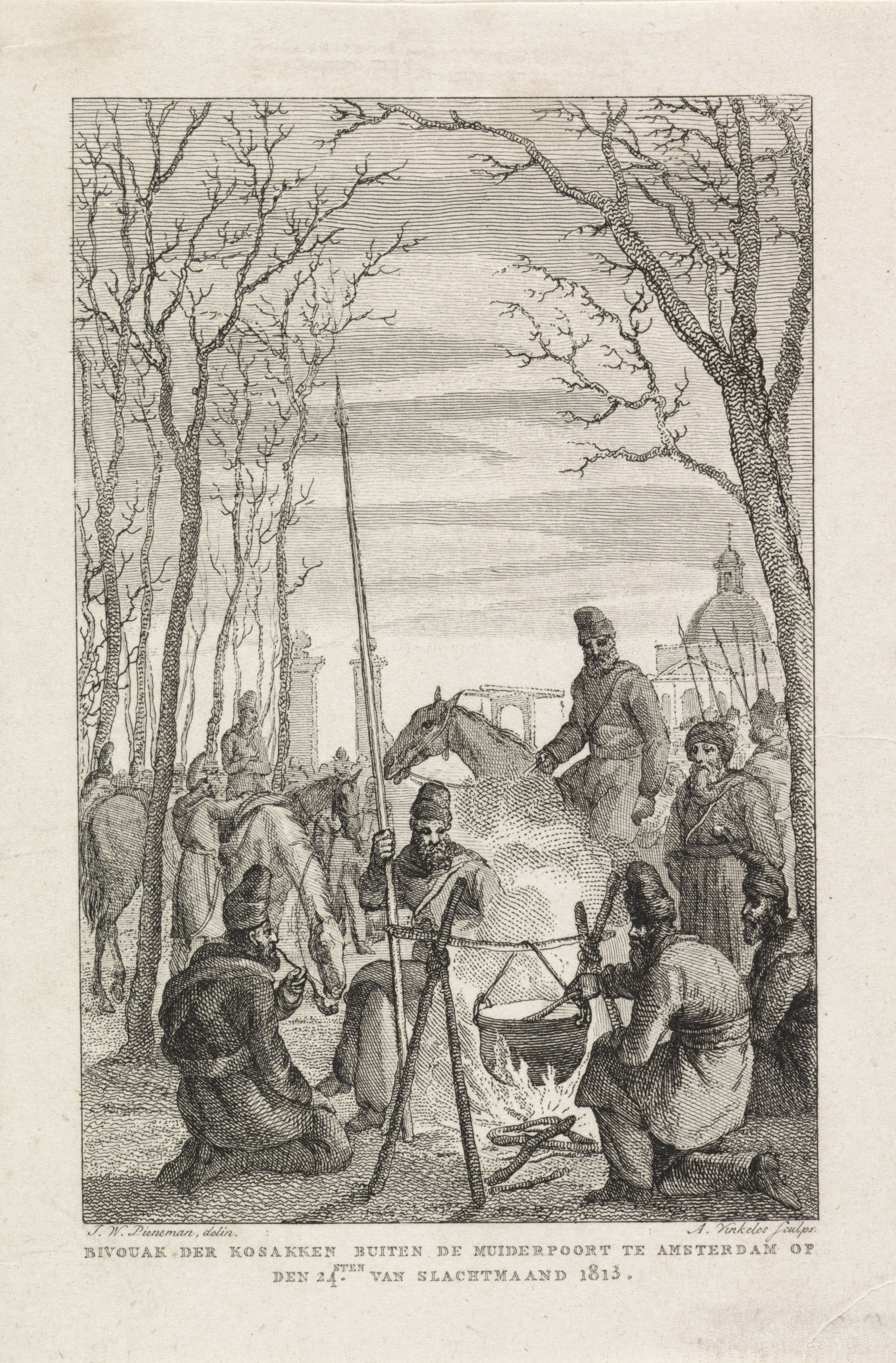 IdentificatieTitel(s): Kozakken bivak bij Amsterdam, 1813Bivouak der kosakken buiten de Muiderpoort te Amsterdam op den 24.sten van slachtmaand 1813 (titel op object)Objecttype: prent Objectnummer: RP-P-OB-87.054Catalogusreferentie: FMH 5846Atlas van Stolk 6292Opschriften / Merken: verzamelaarsmerk, verso, gestempeld: Lugt 2228Omschrijving: Bivak van de kozakken buiten de Muiderpoort bij Amsterdam, 24 november 1813. Soldaten verzameld rond een kookpot op een kampvuur.VervaardigingVervaardiger: prentmaker: Abraham Vinkeles (vermeld op object)naar tekening van: Jan Willem Pieneman (vermeld op object)Plaats vervaardiging: NederlandDatering: 1814 - 1816Fysieke kenmerken: ets en gravureMateriaal: papier Techniek: etsen / graveren (drukprocedé)Afmetingen: blad: h 180 mm × b 120 mmToelichtingGebruikt als illustratie in: J. Konijnenburg, Nationaal gedenkboek der hernieuwde Nederlandsche Unie, van den jare 1813, 's-Gravenhage: Johannes Allart, 1816.OnderwerpWat: (military) camp with tentscanteen ~ the soldier off dutykitchen-fire - CC - in the open airKozakken te Nederland (1813)Wanneer: 1813-11-24 - 1813-11-24Waar: Tweede MuiderpoortVerwerving en rechtenVerwerving: aankoop 1881Copyright: Publiek domein